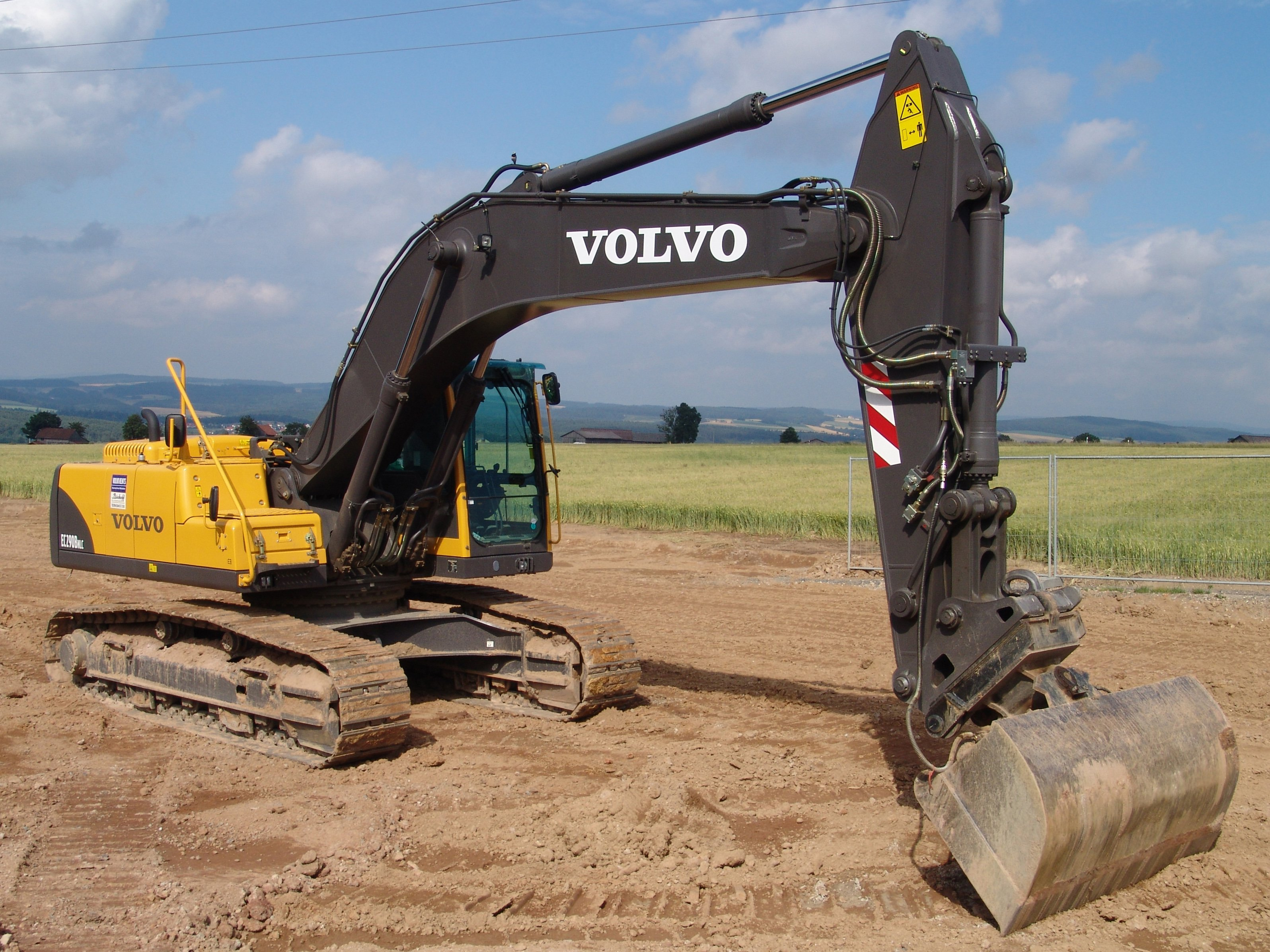 Volvo Kettenbagger EC290B